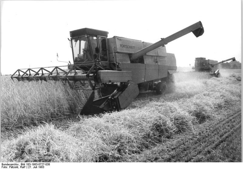 LPG Plate, Roggenernte ADN-ZB Pätzold-27.7.83 Bez. Schwerin: Roggenernte. Jede verfügbare Erntestunde nutzend bringen die Genossenschaftsbauern der LPG Plate vor den Toren der mecklenburgischen Bezirksstadt Schwerin die Roggenernte ein. Von insgesamt 1500 Hektar ist hier das Brotgetreide verlustarm zu ernten.